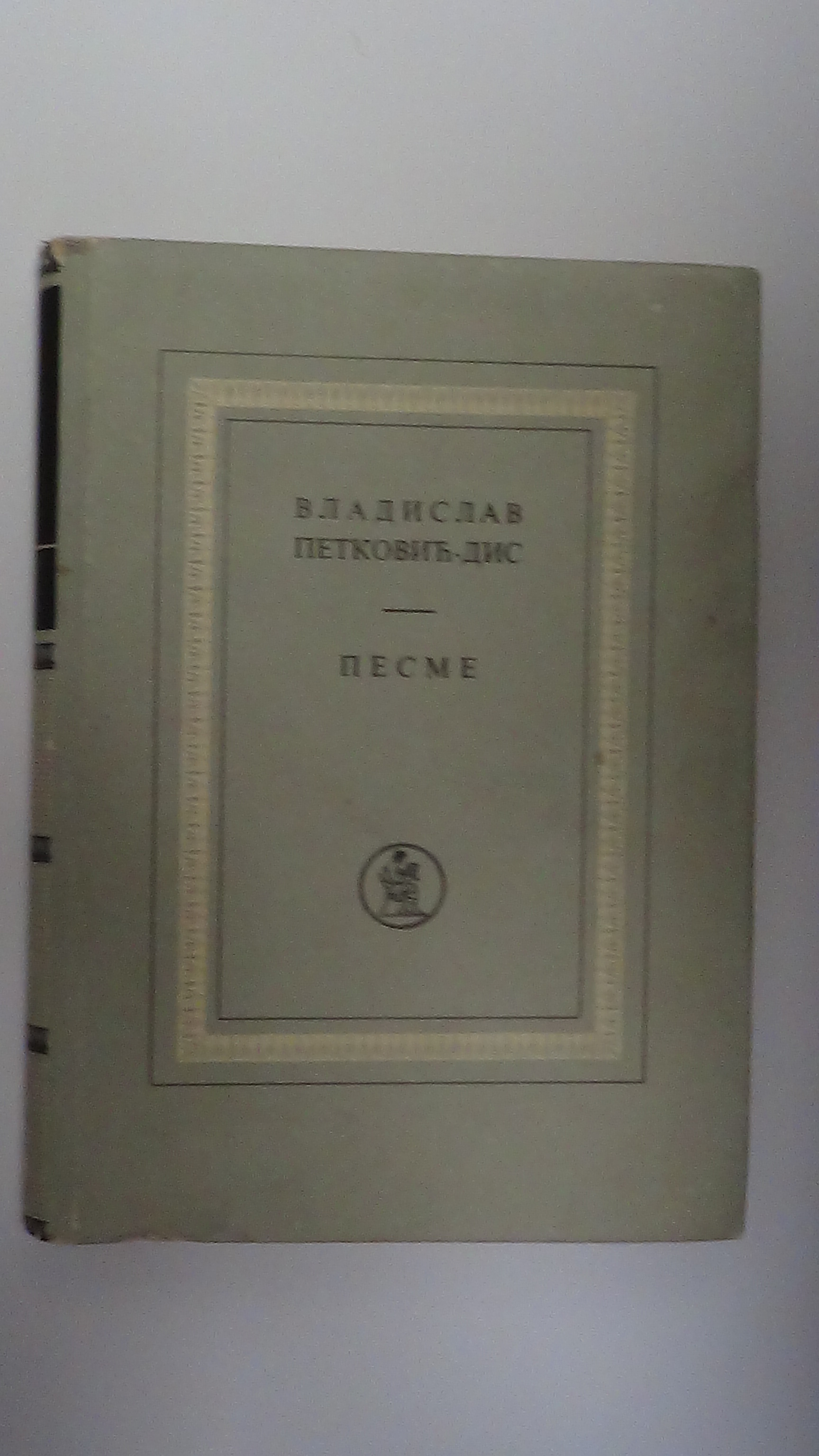 Корицата на збирката „Песни“, Рад, Белград, 1960.